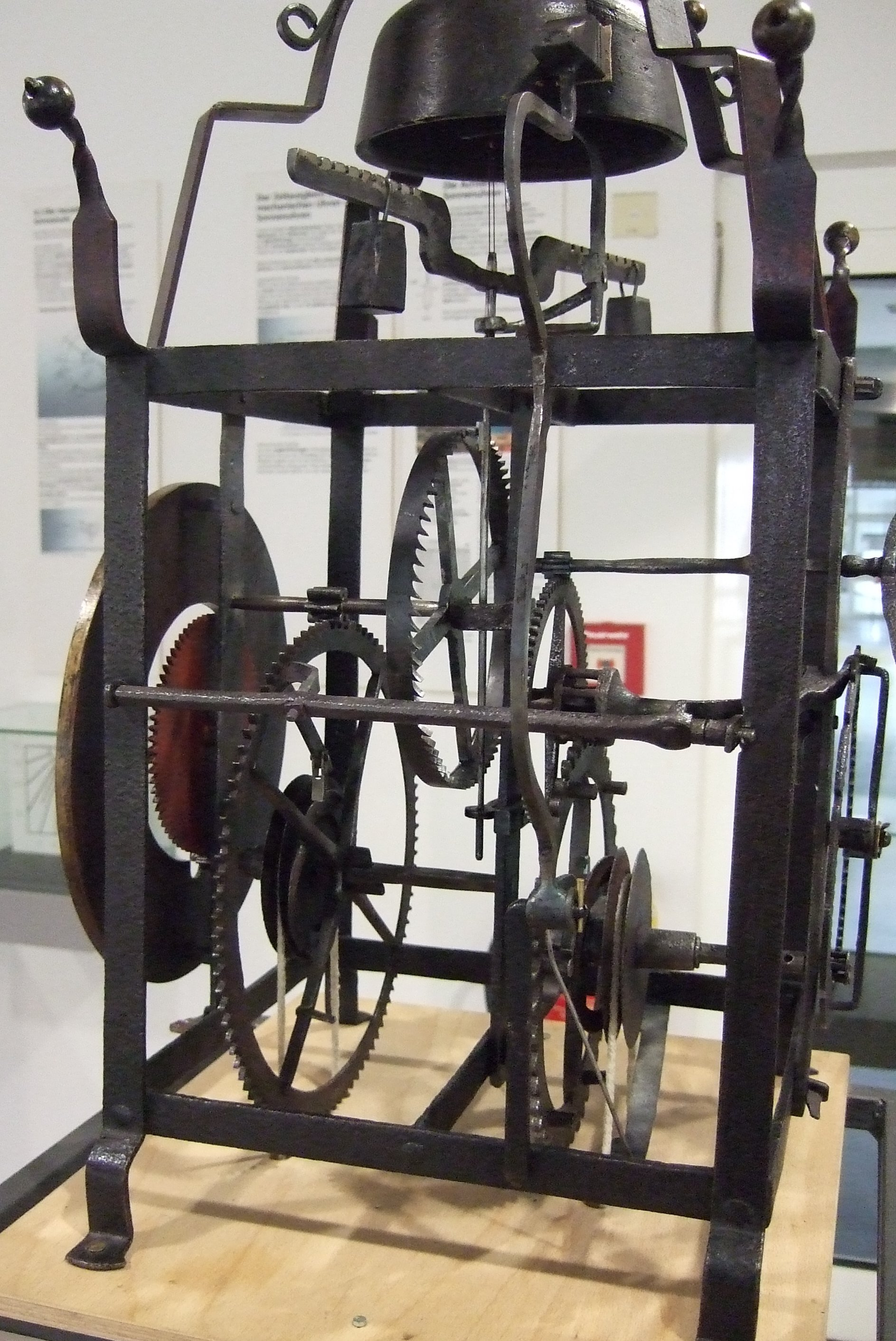 Uhr im Deutschen Uhrenmuseum